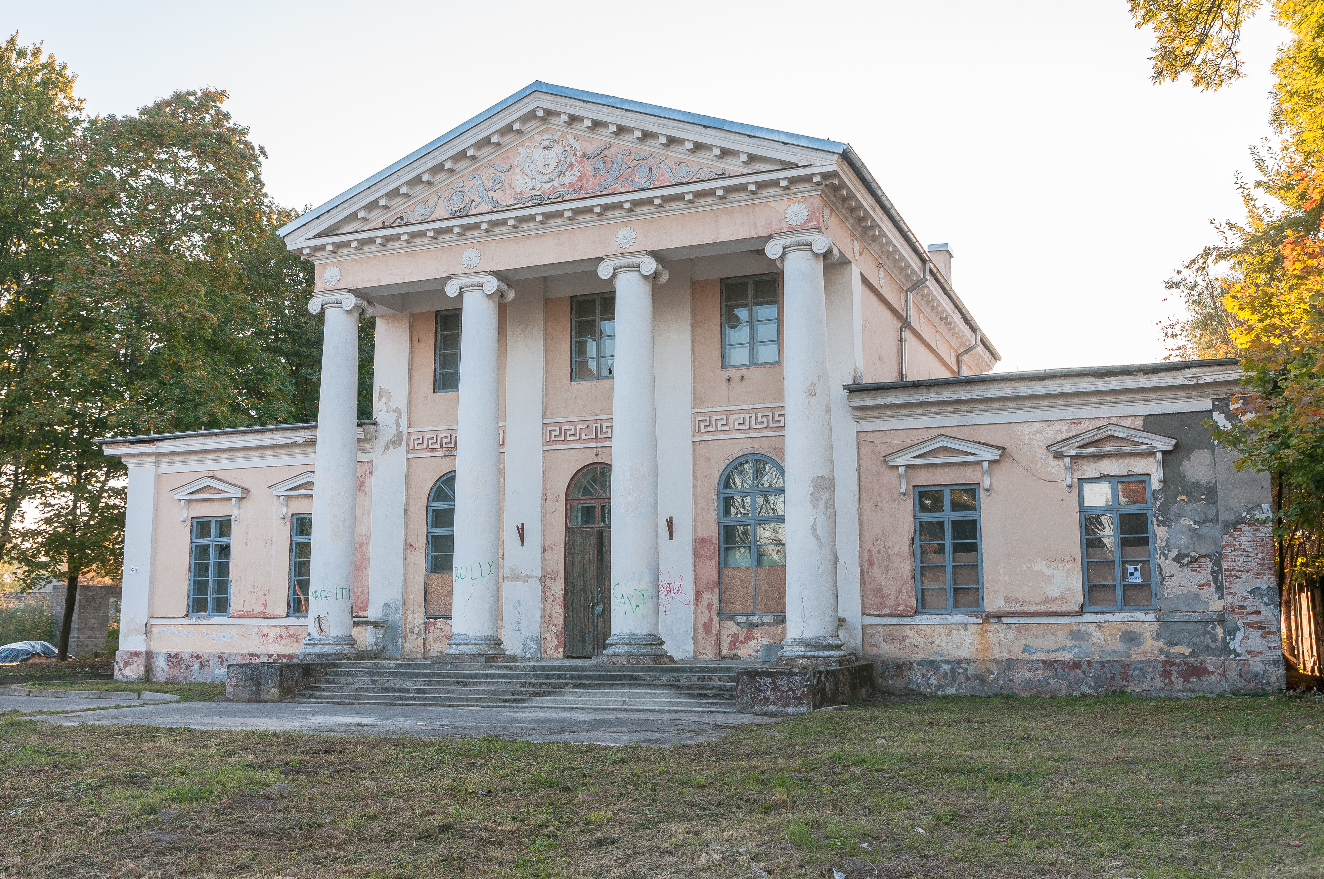 Dzīvojamā ēka "Villa Medem" ar dārzu, Jelgava, Uzvaras iela 55